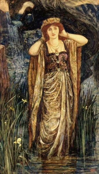 Guinevere